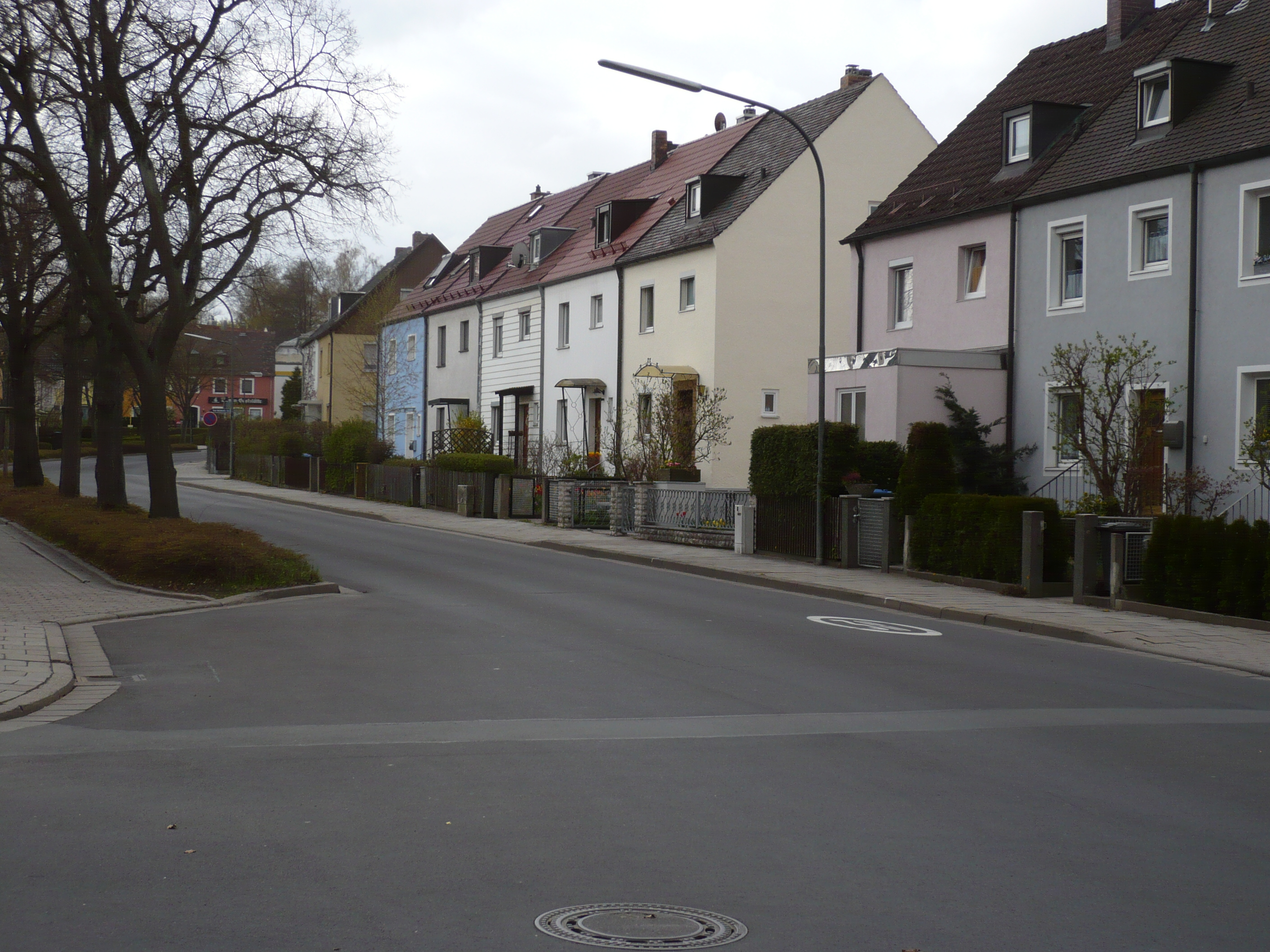 Bayreuth Birkenstraße